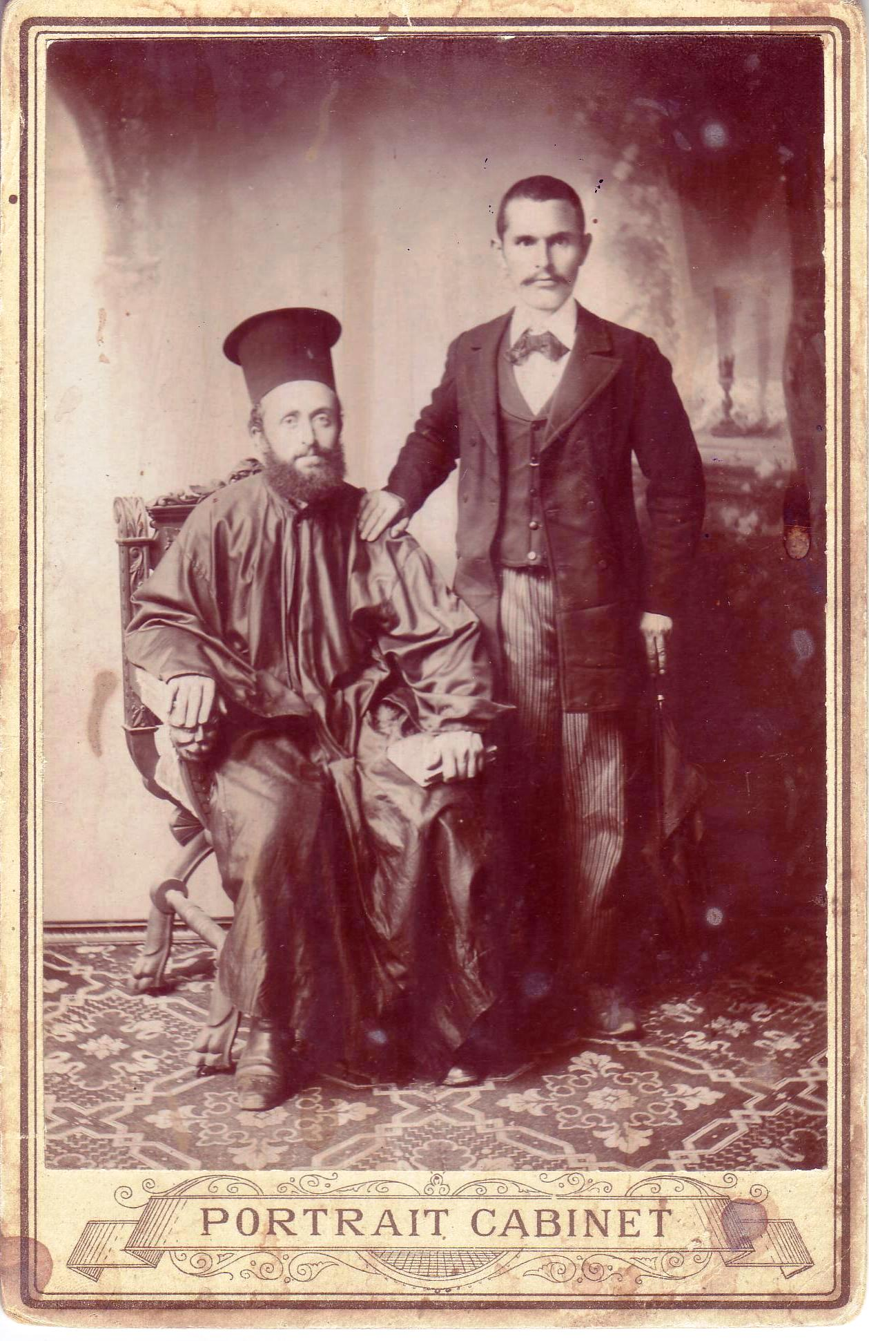 Ο παπα-ΣΤΑΥΡΟΣ με τον παιδικό του φίλο ΓΡΗΓΟΡΙΟ ΧΑΣΟ